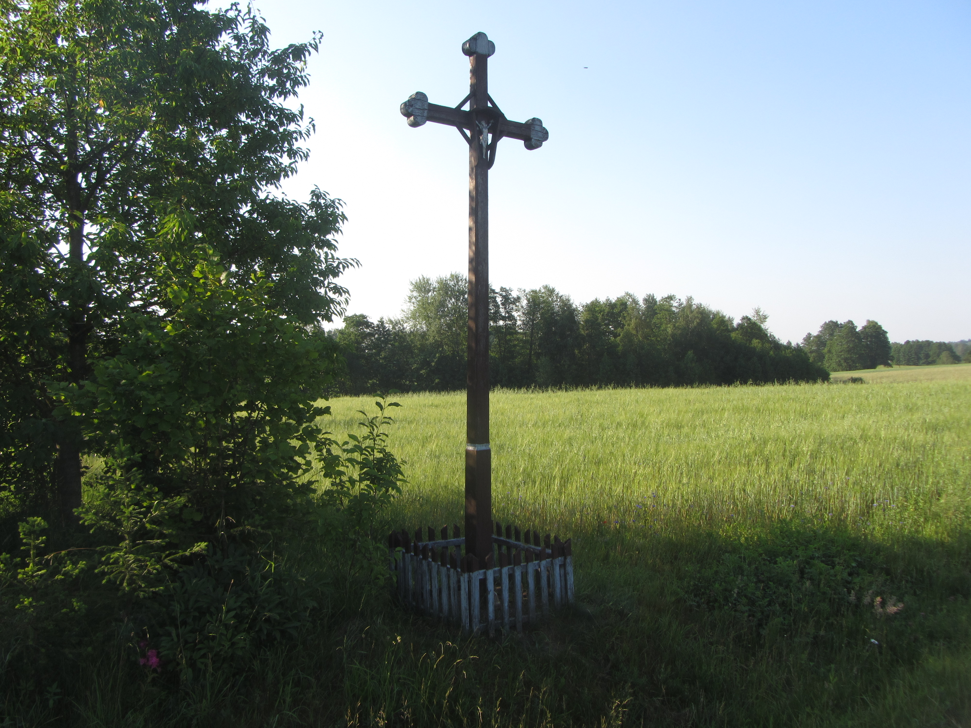 Miroslavo sen., Lithuania